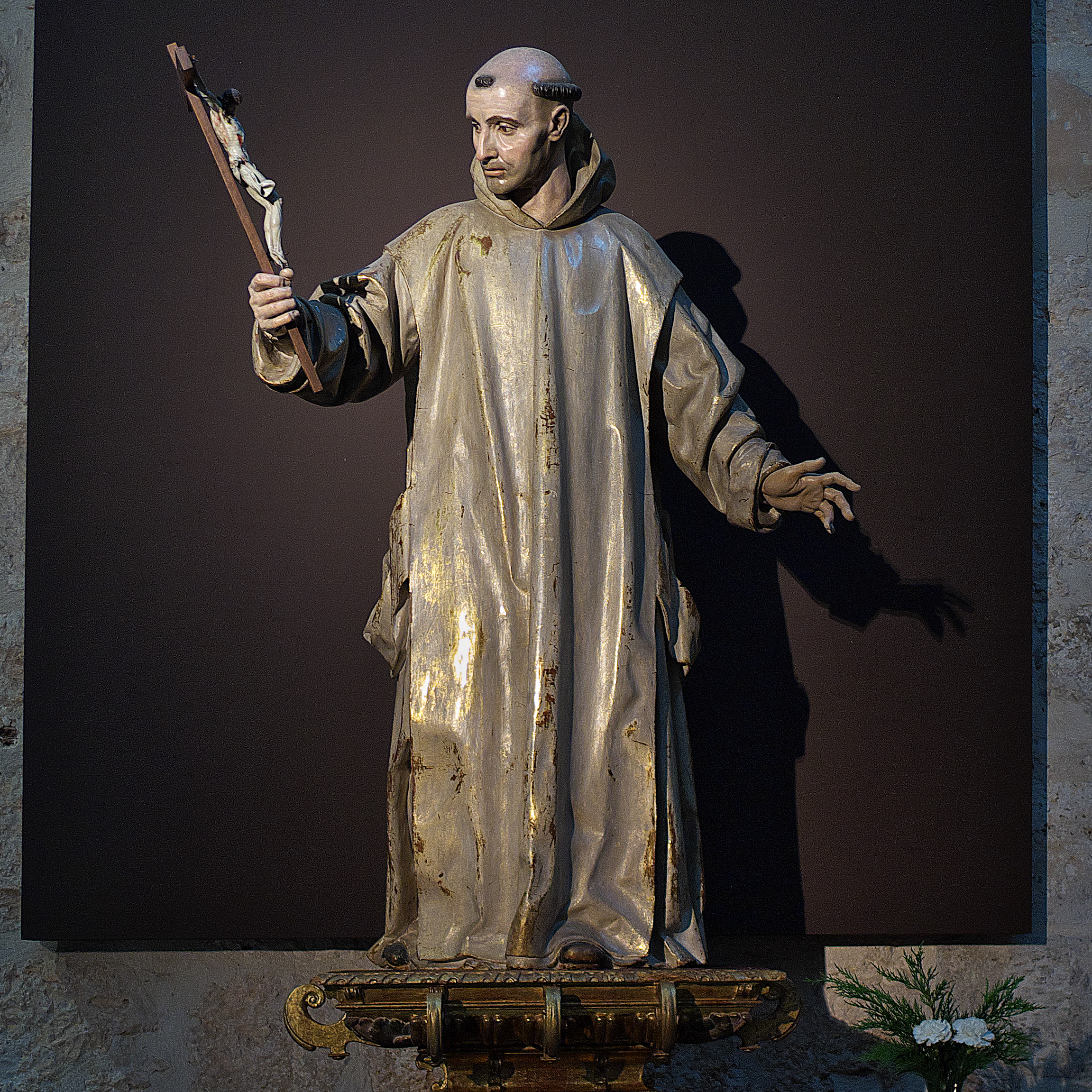 Cartuja Santa María de Miraflores (Burgos). Manuel Pereira (1635)